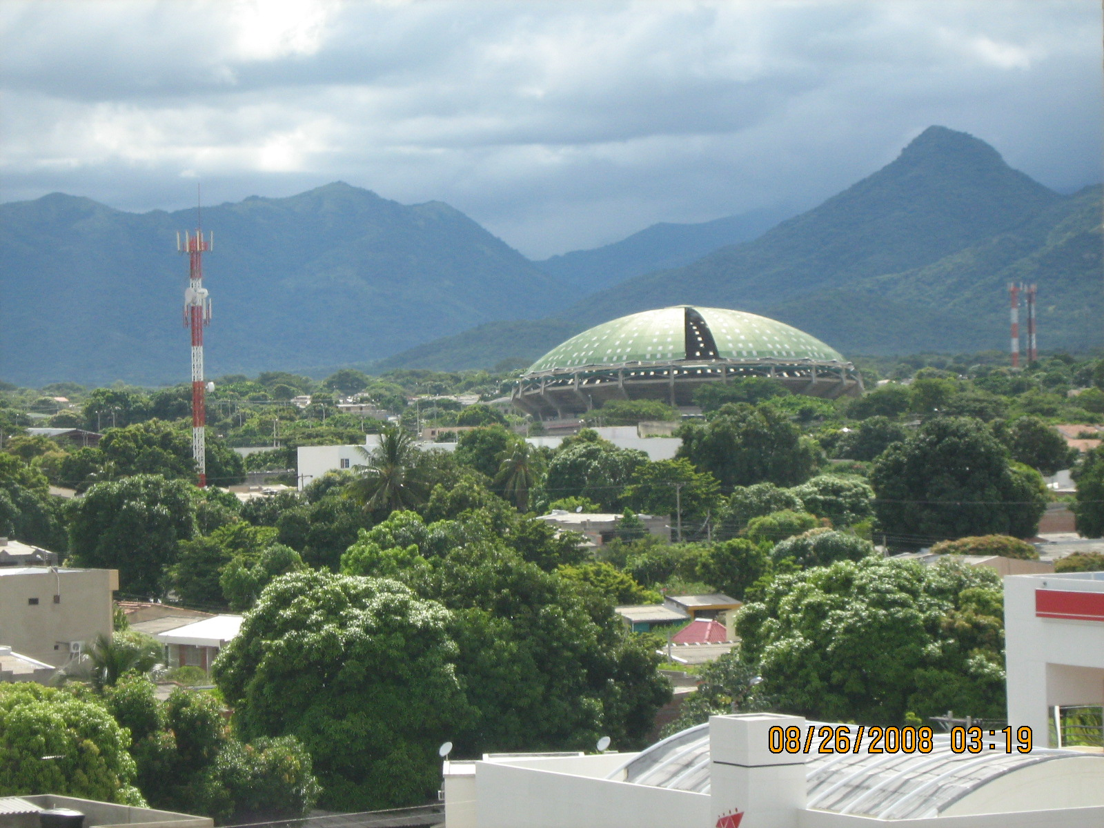 Coliseo Cubierto Julio Monsalvo. Valledupar, Colombia